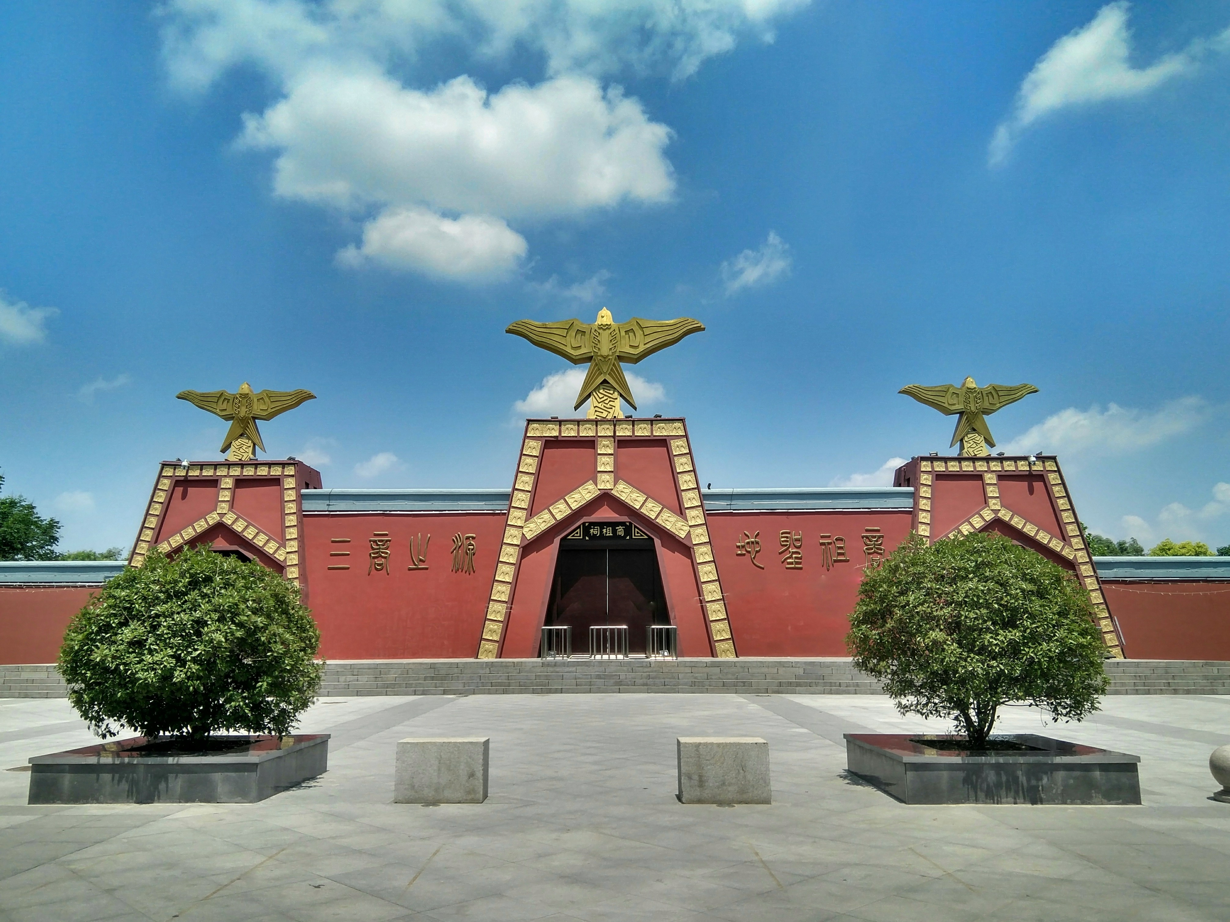 火神台，商祖祠